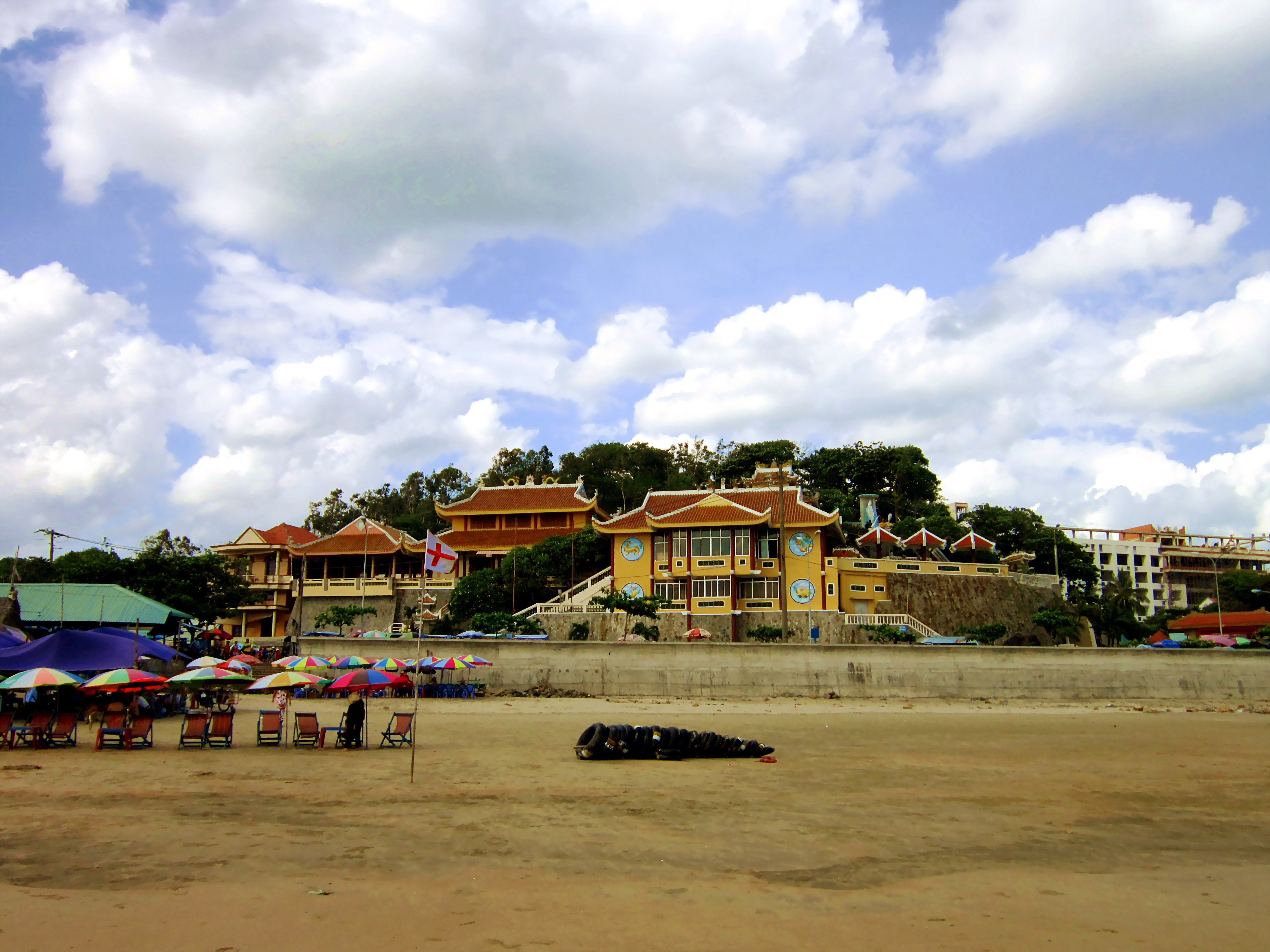 Dinh Cô là một khu đền ở thị trấn Long Hải, huyện Long Điền, tỉnh Bà Rịa-Vũng Tàu, Việt Nam.